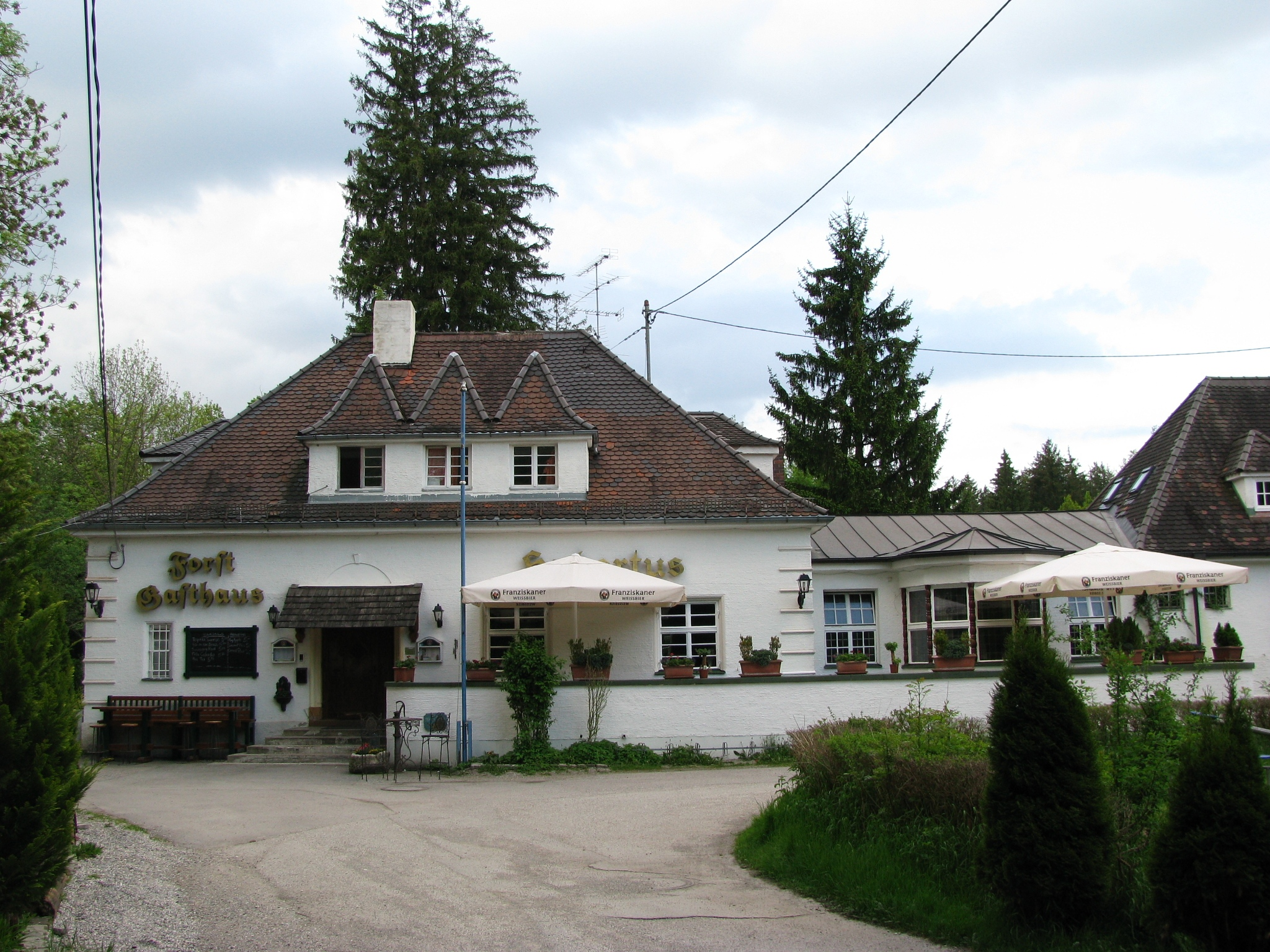 Gasthaus der Schießstätte Hubertus im Forstenrieder Park an der Stadtgrenze zu München.